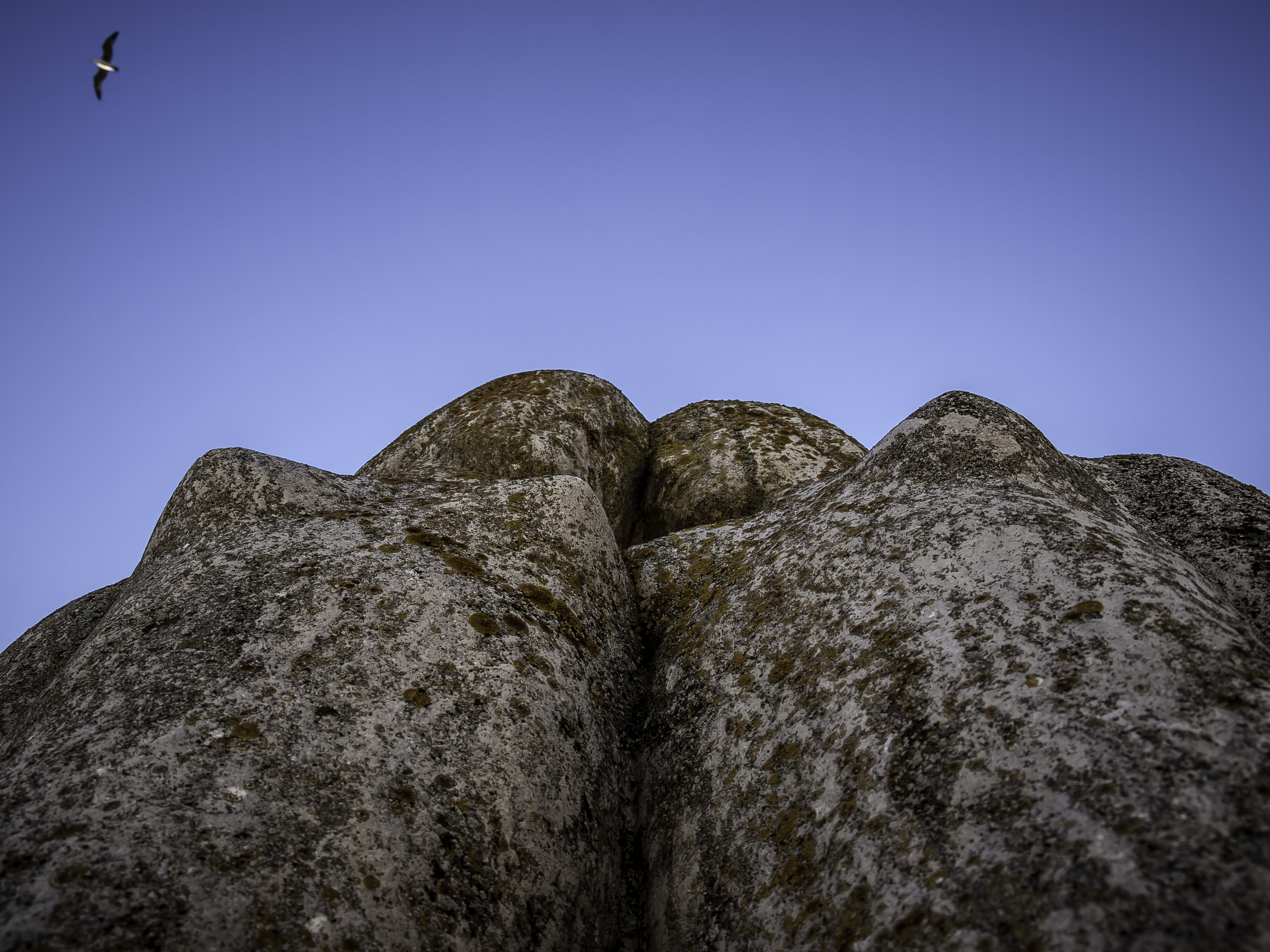 Grupul statuar Confidența este localizat in fata hotelului Victoria, in localitatea Mamaia, Constanta.